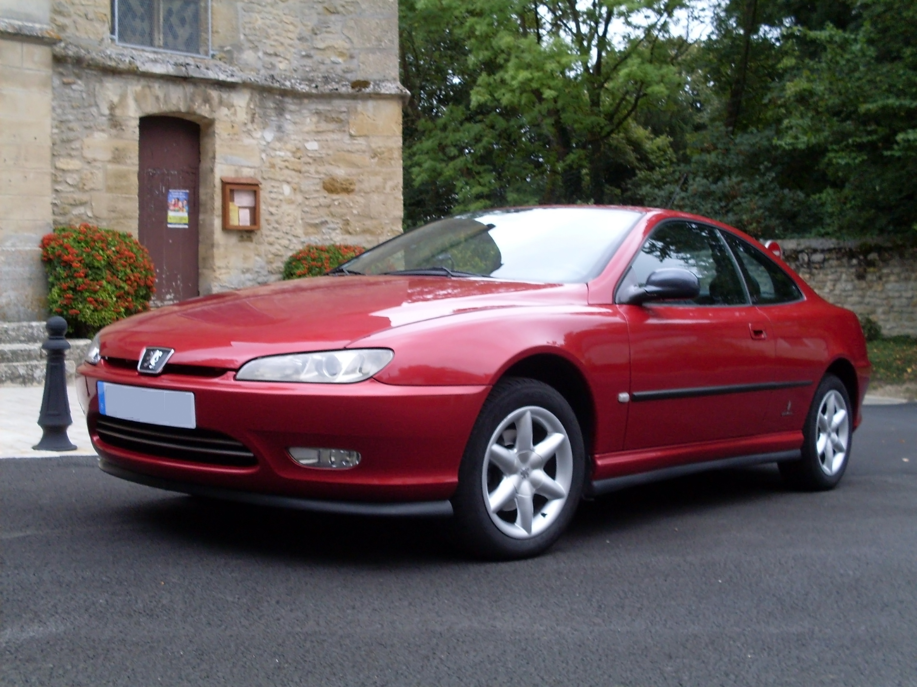 Peugeot 406 Coupé rouge lucifer 2.0l 137ch.